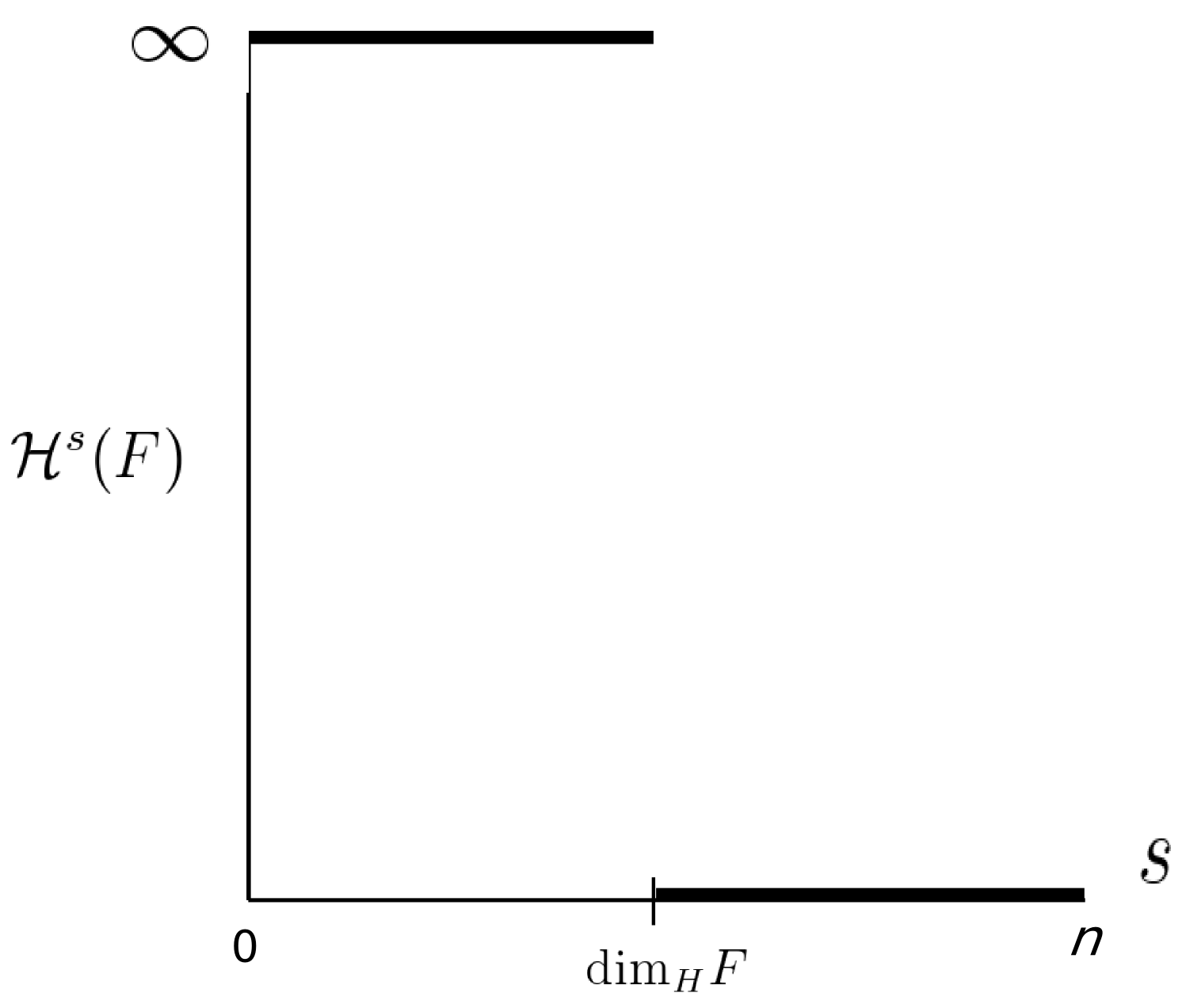 Es una gráfica de la medida de Hausdorff donde se muestra el salto de la función de infinito a cero, el valor de la función en el salto se corresponde a la dimensión de Hausdorff.